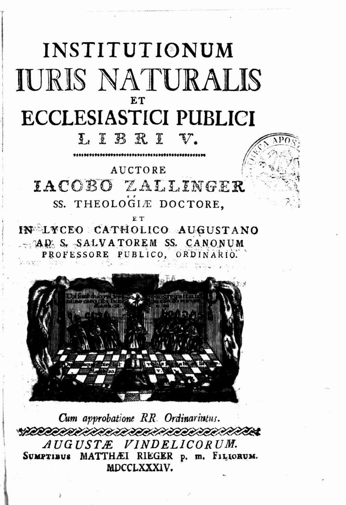 Frontespizio